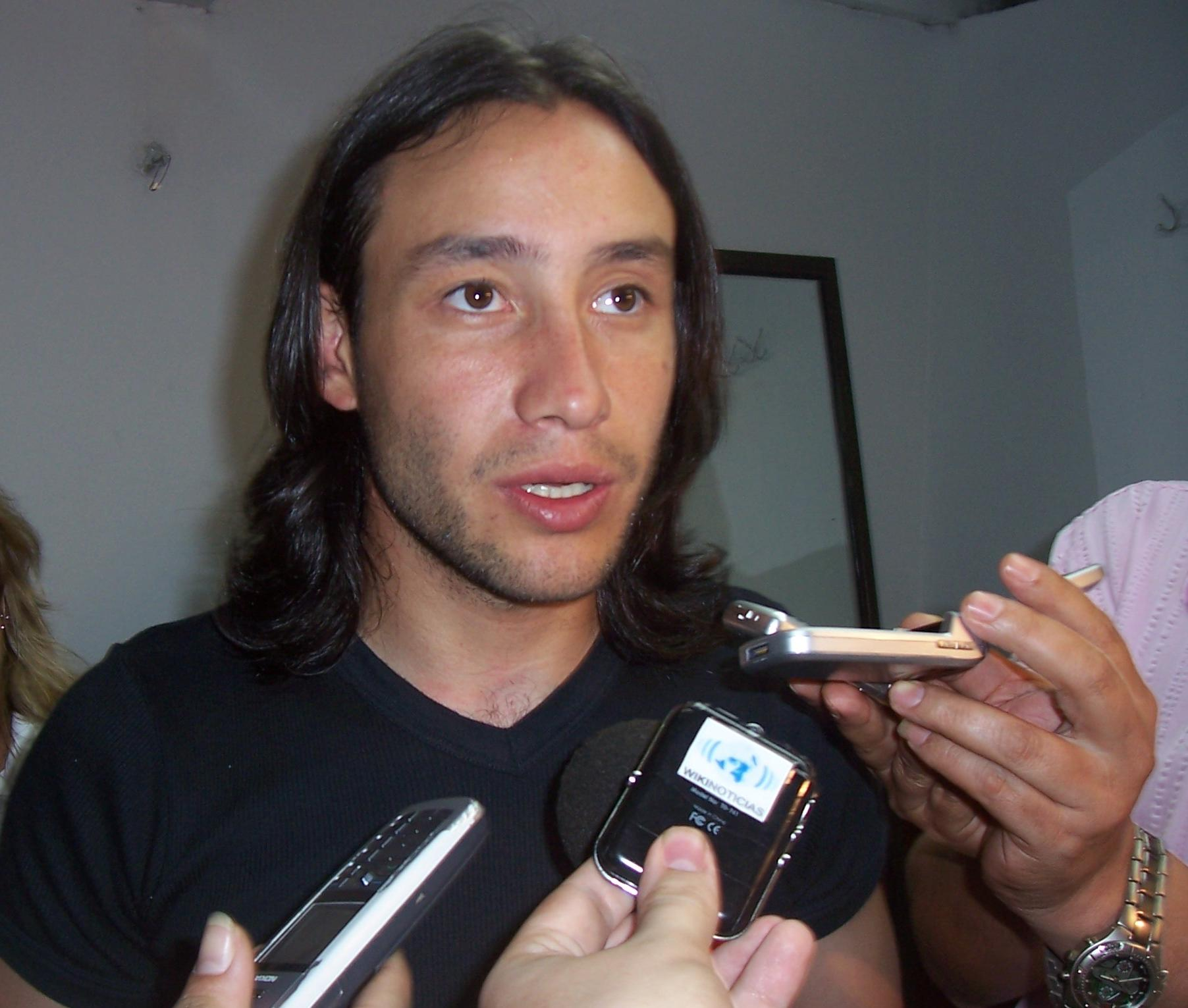 El cantante Luciano Pereyra en la 28º edición de la Fiesta Nacional del Inmigrante en Oberá, provincia de Misiones, Argentina.